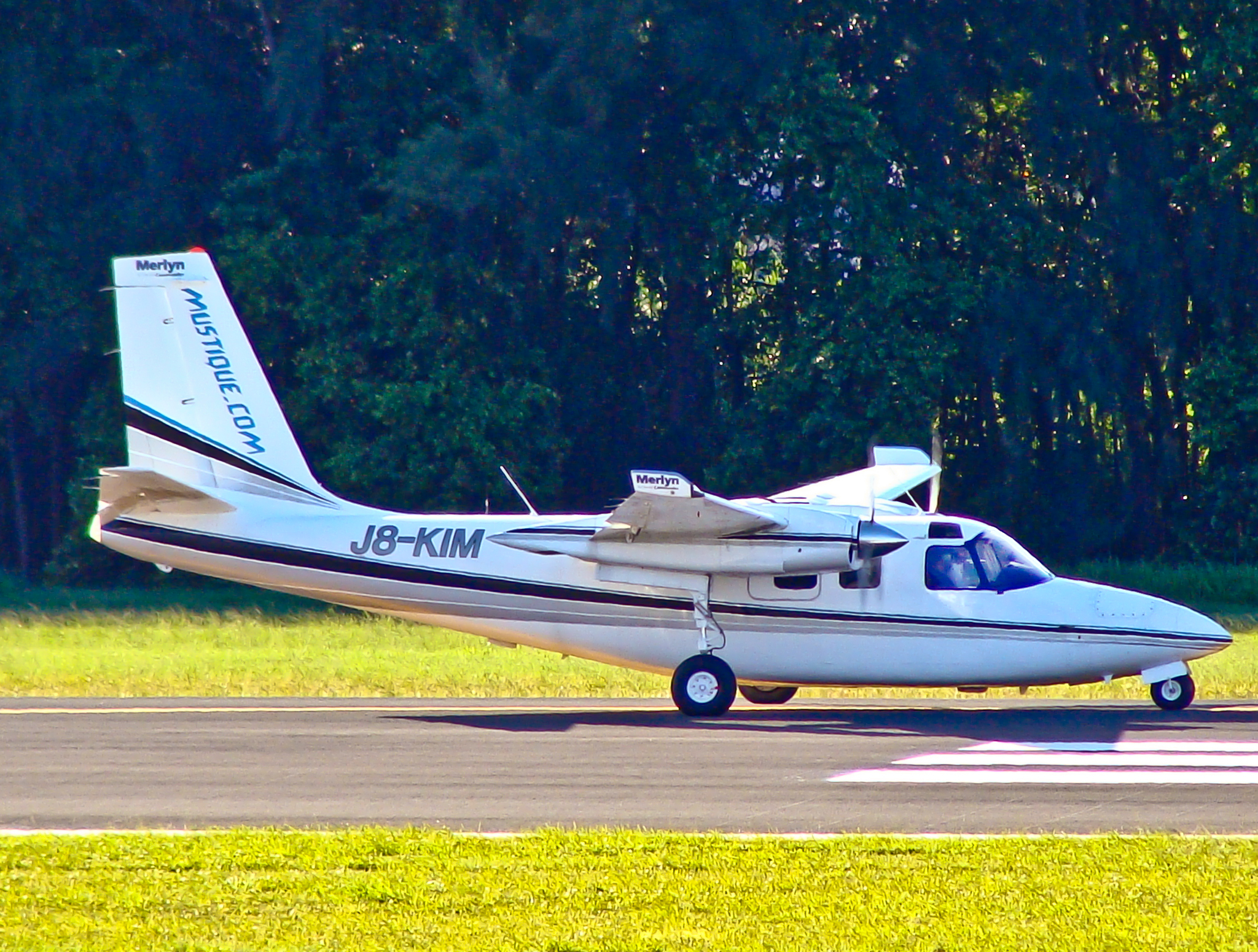 San Juan - Luis Muñoz Marin International (SJU/TJSJ) - Puerto Rico 2009 Photo: Tomás Del Coro Aeroparque